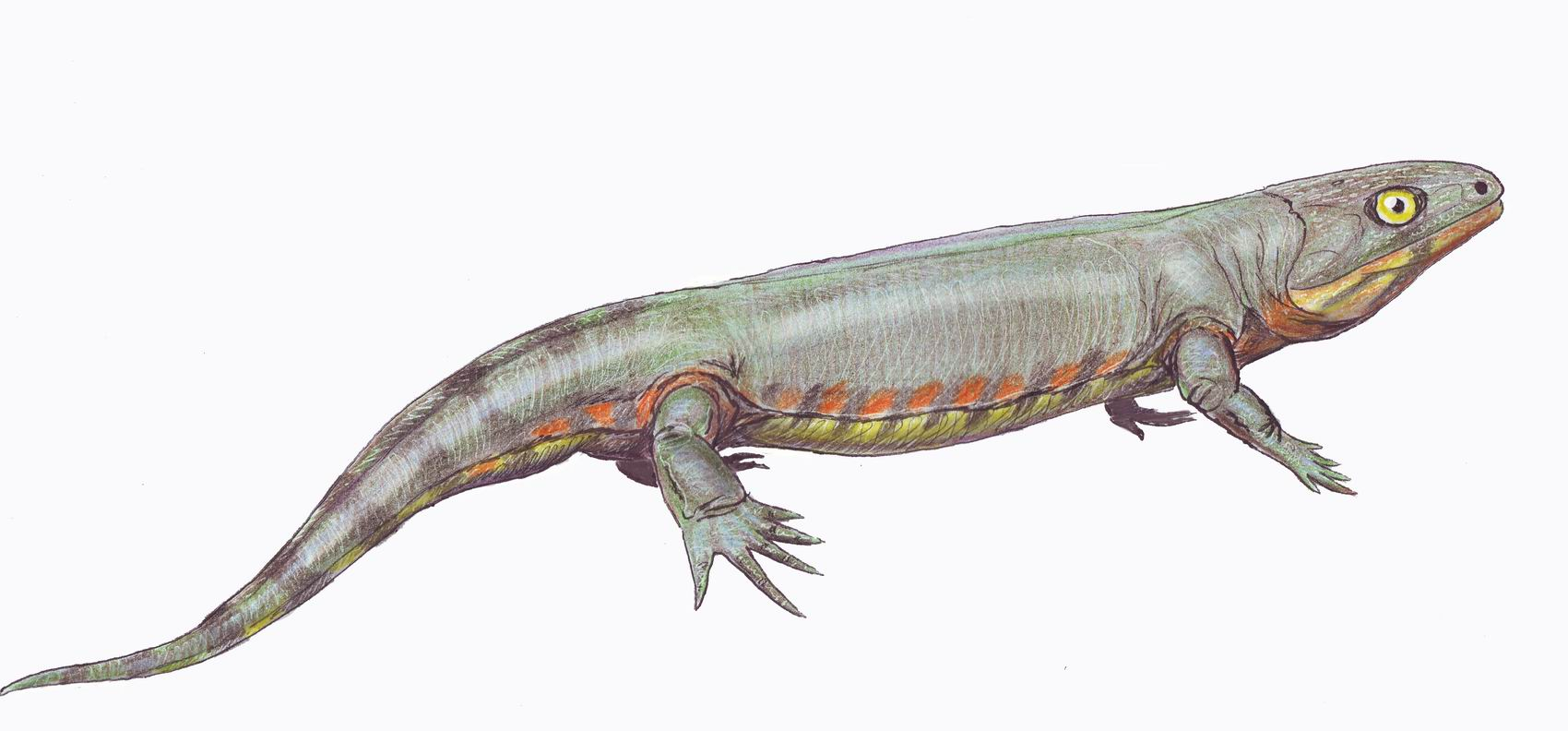 Silvanerpeton miripedes